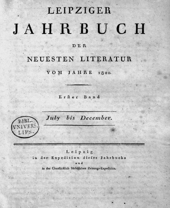 Leipziger Literaturzeitung, Titelblatt, 1. Bd. July-Dezember, 1800